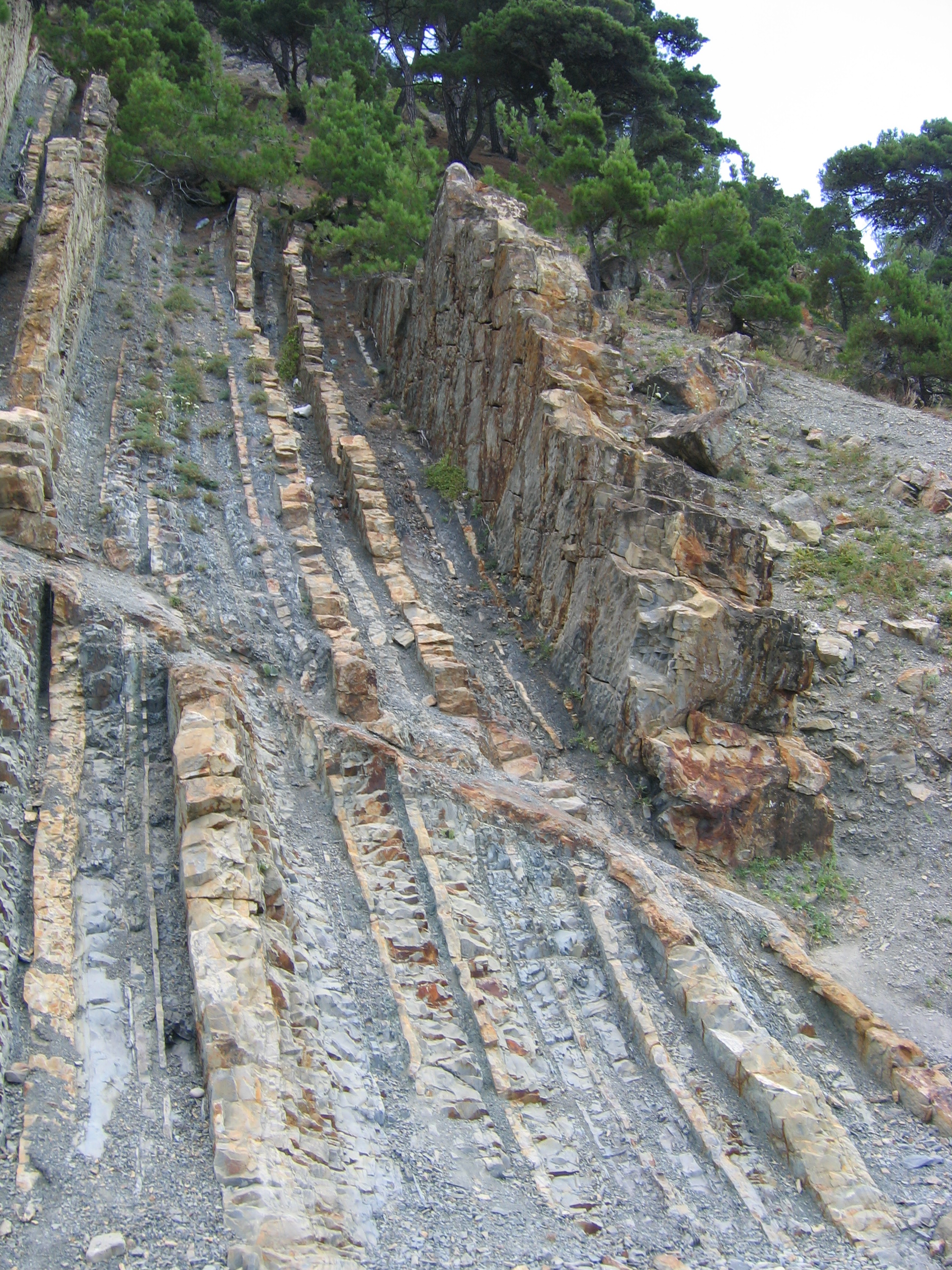 Rocks. Parus rock, Krasnodar krai, Russia.